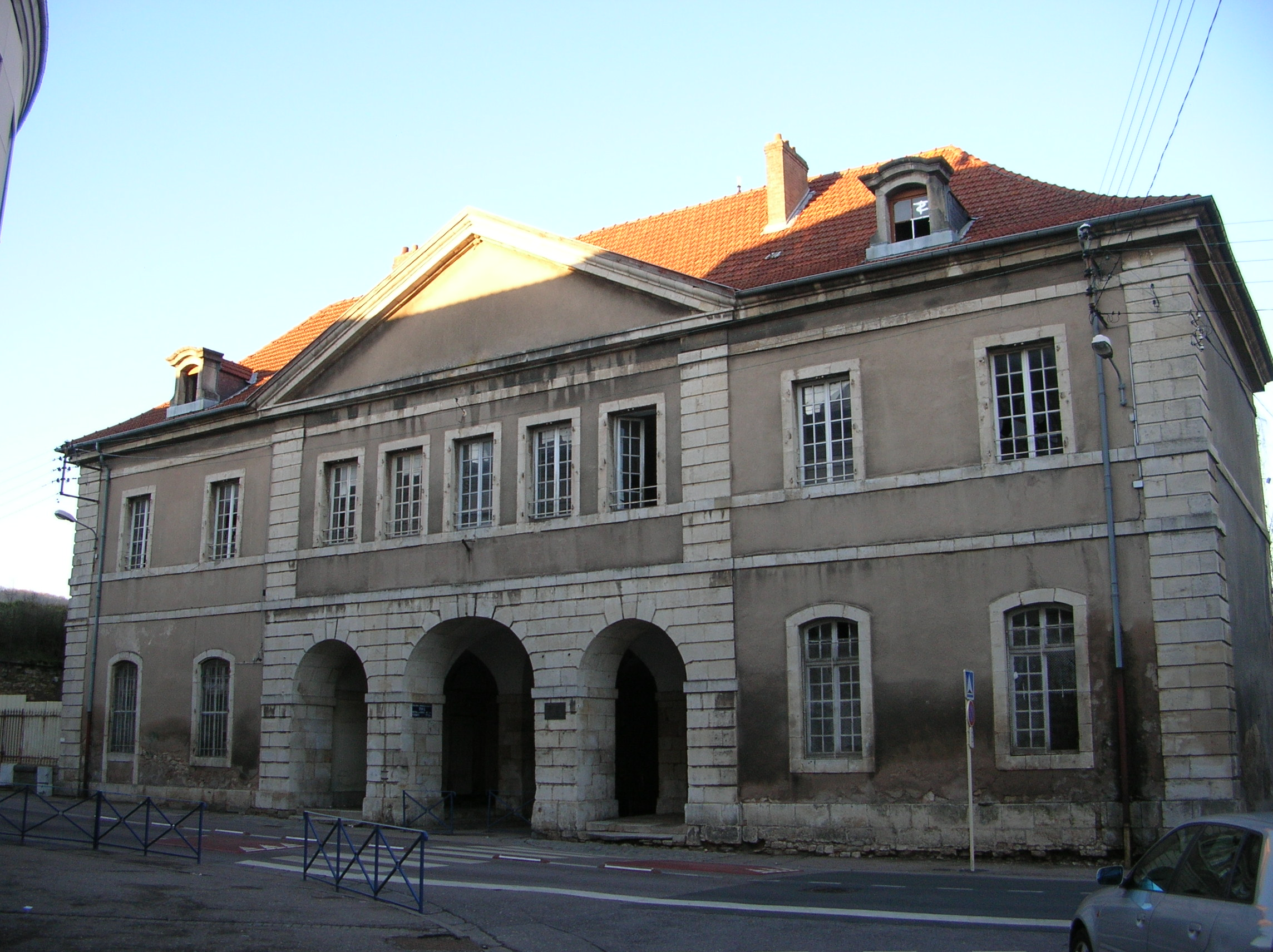 Édifice fortifié fin 17ème siècle sur des plans établis par Vauban.